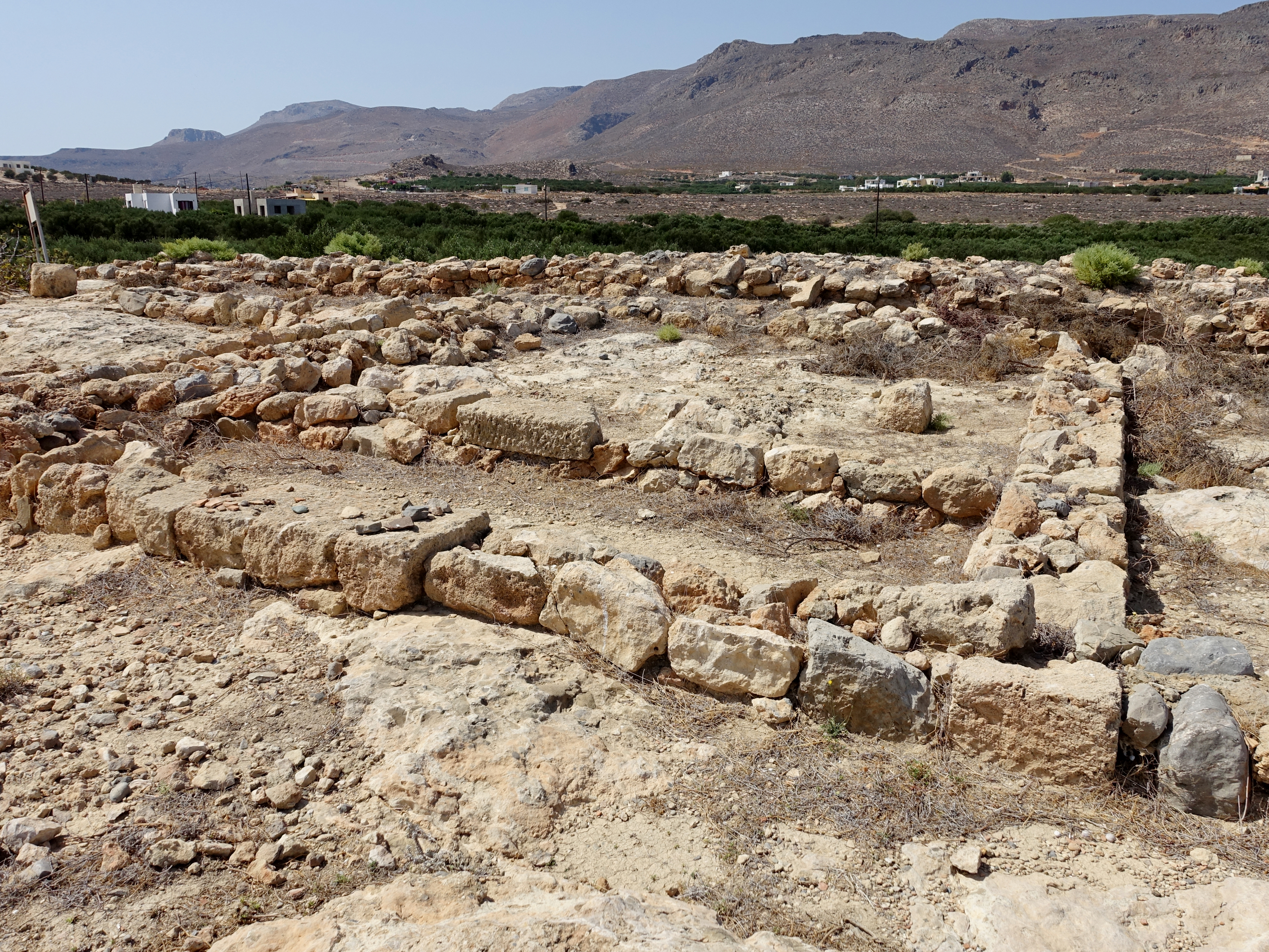 Hellenistische Siedlung auf dem Hügel Farmakokefalo (Φαρμακοκέφαλο) an der Ostküste Kretas bei Xerokambos (Ξερόκαμπος), Gemeinde Sitia, Kreta, Griechenland